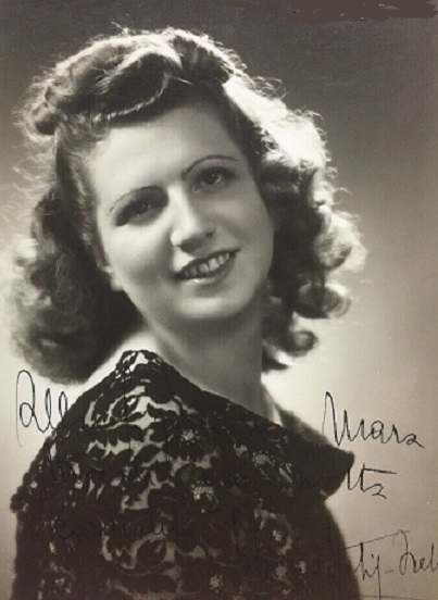 Sabina Actis-Orelia